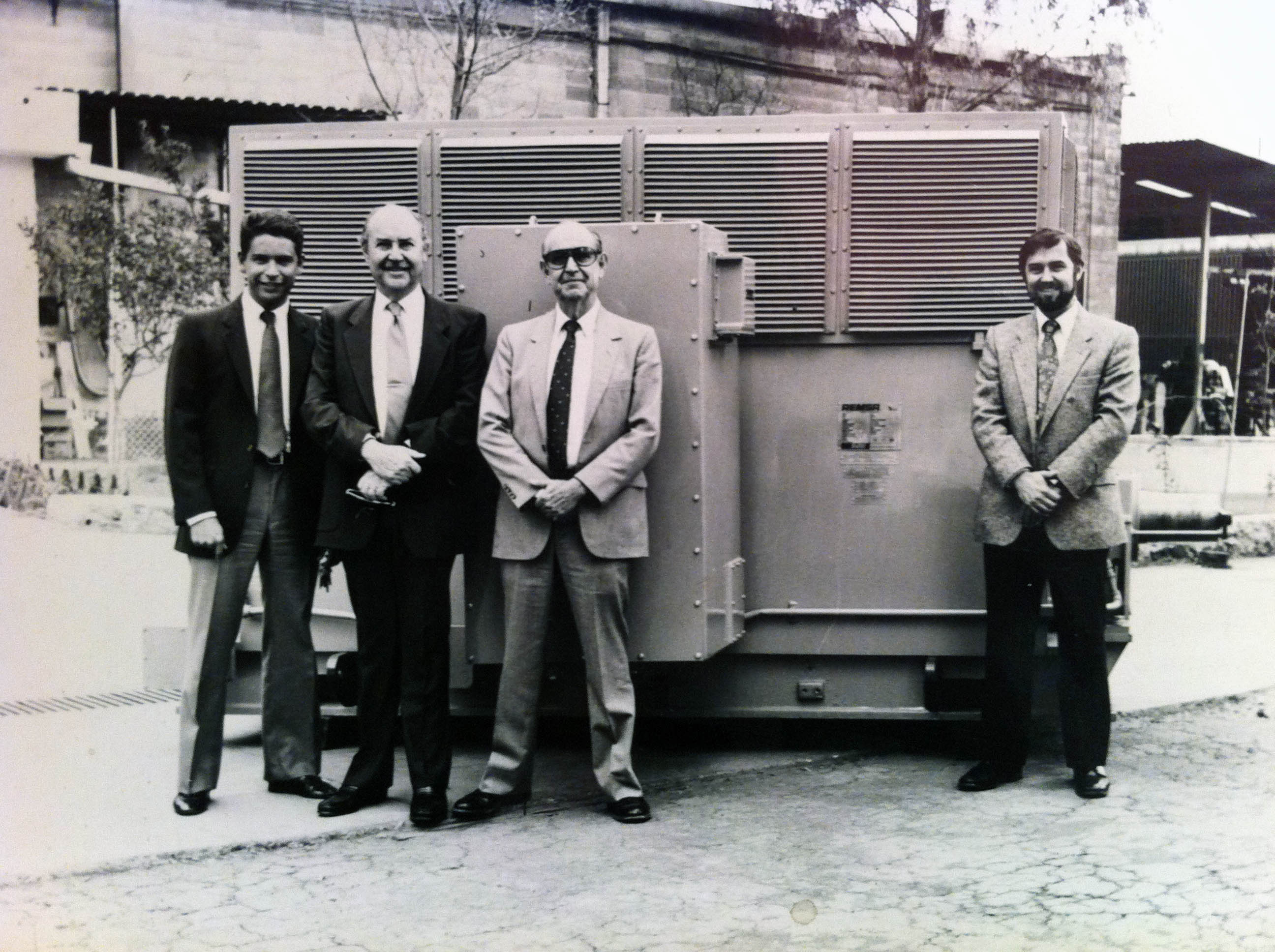 Gustavo Gottfried (hijo), Mario H. Gottfried, Gustavo Gottfried y Carlos F. Gottfried, junto a motor eléctrico de 6500 HP producido por Reliance de México, S.A de C.V. Fuente: Potencia Industrial, S.A.